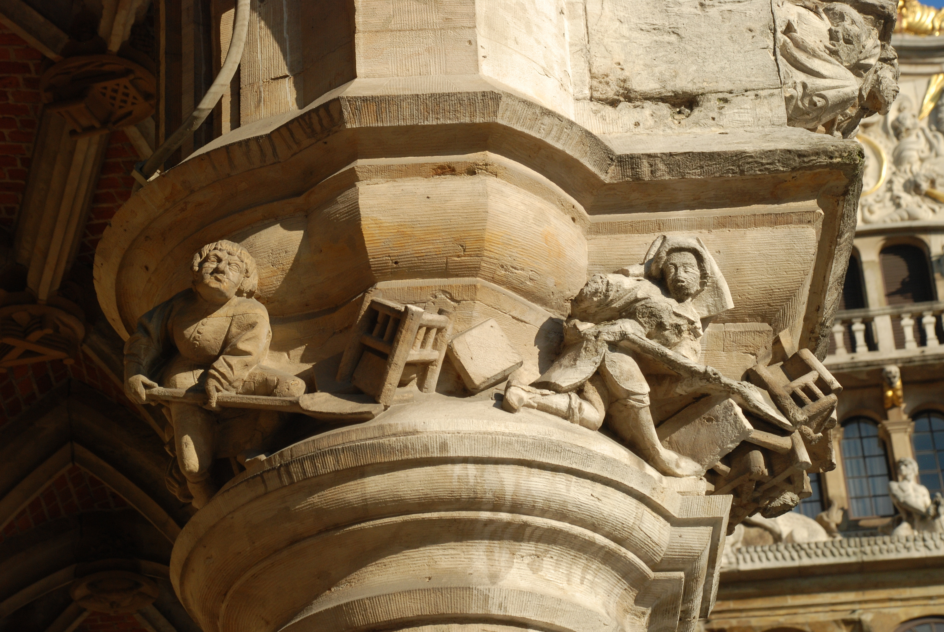 Belgique - Bruxelles - Grand-Place - Hôtel de Ville - Maison de l'Estrapade (Scupstoel)